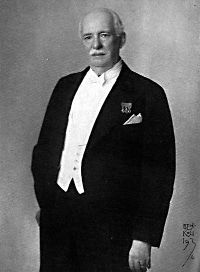 Hjalmar Meissner